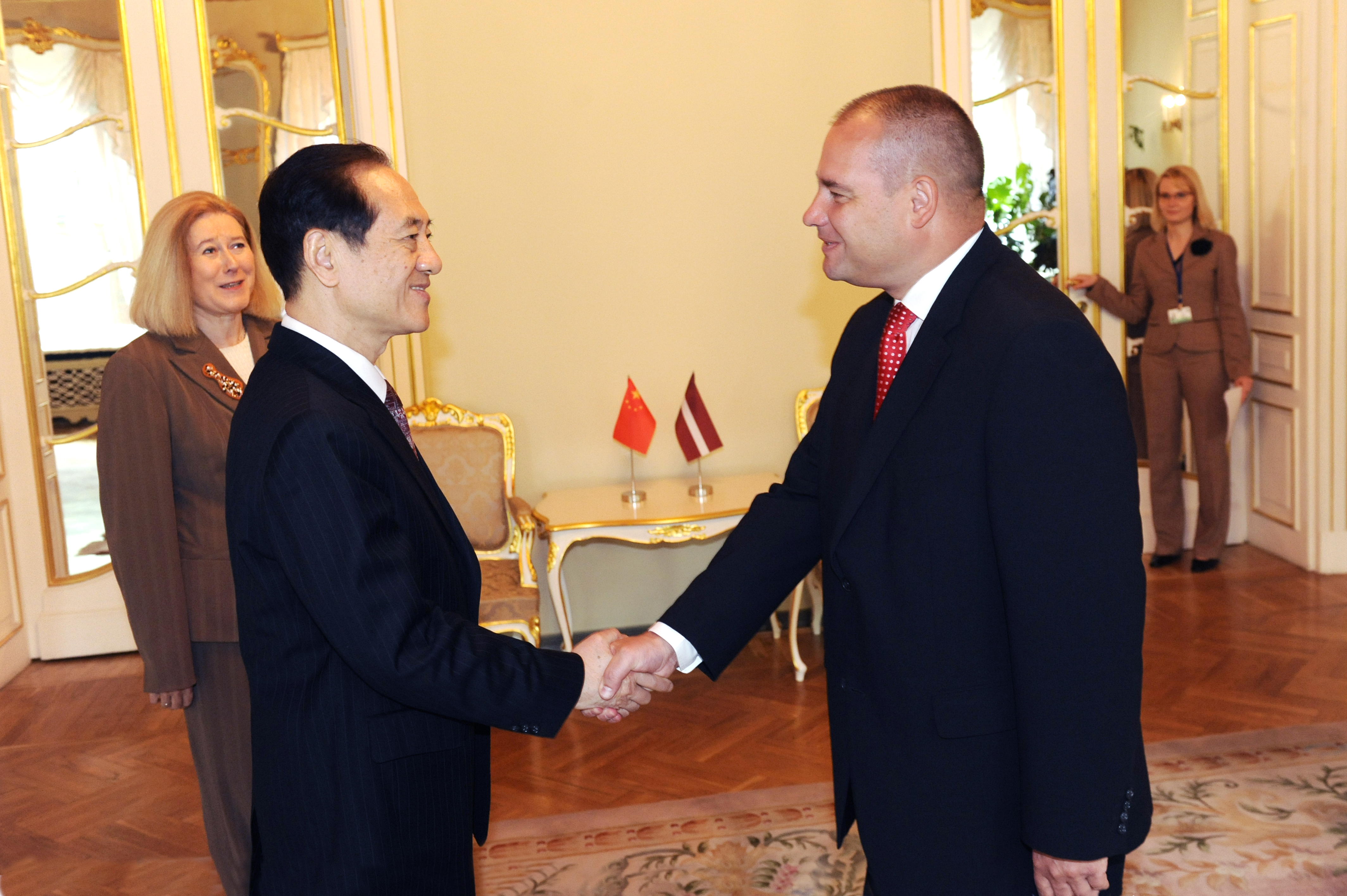 2011.gada 20.maijs. Saeimas priekšsēdētājas biedrs Gundars Daudze tiekas ar Visķīnas Nacionālā tautas kongresa priekšsēdētāja vietnieku Haņu Cjide (Han Qide)